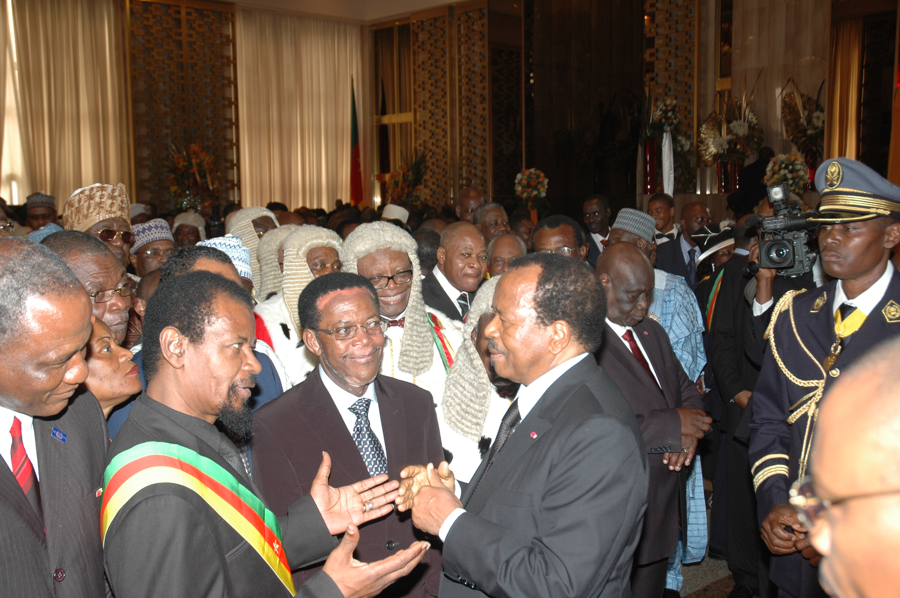 Entretien du Président Paul avec M. Jean Jacques Ekindi, président du Mouvement progressiste, pendant la cérémonie de présentation des voeux